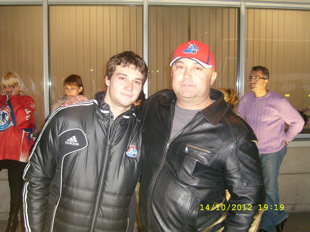 Егор Яковлев с отцом